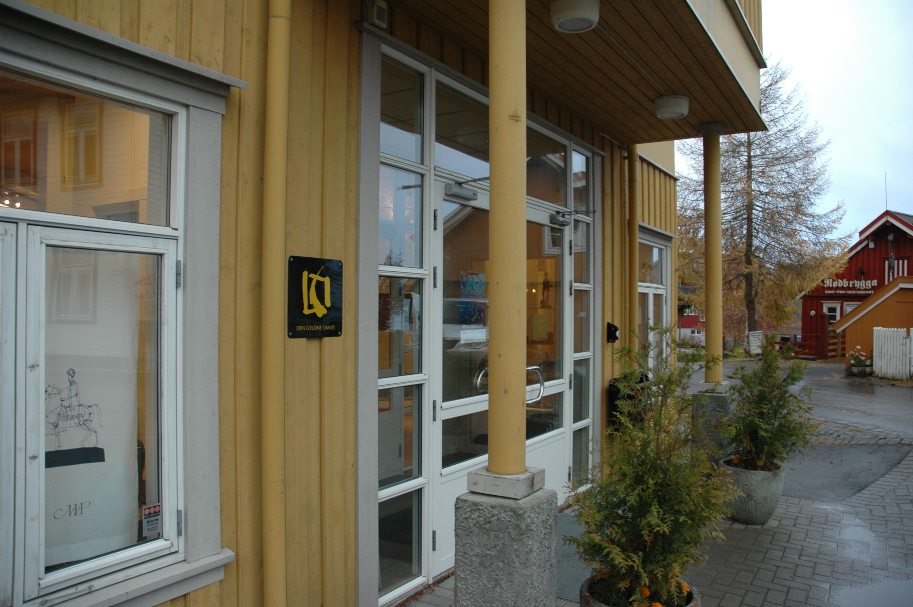 Bildet fra inngangen til Nils Aas Kunstverksted på Straumen i Inderøy kommune